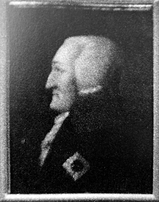 Russ Senator Balthasar (II.) Freiherr von Campenhausen (1797)